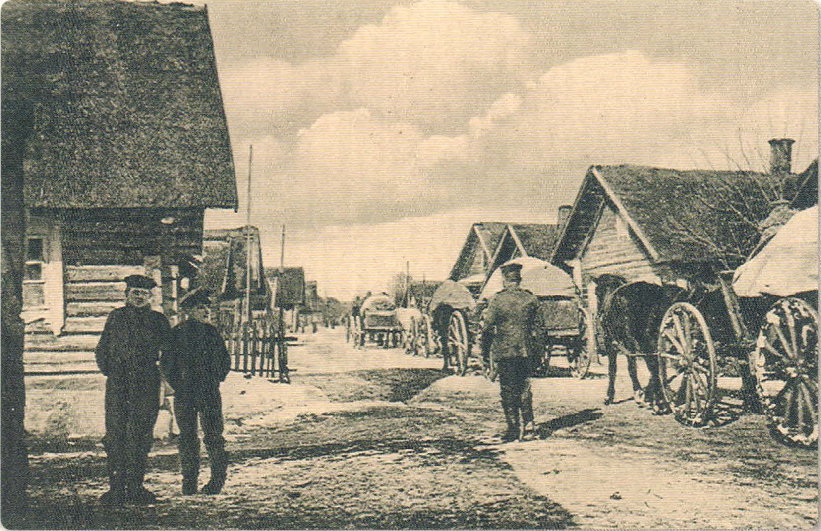 Беларуская (тарашкевіца): Багданаў (Bahdanaŭ)